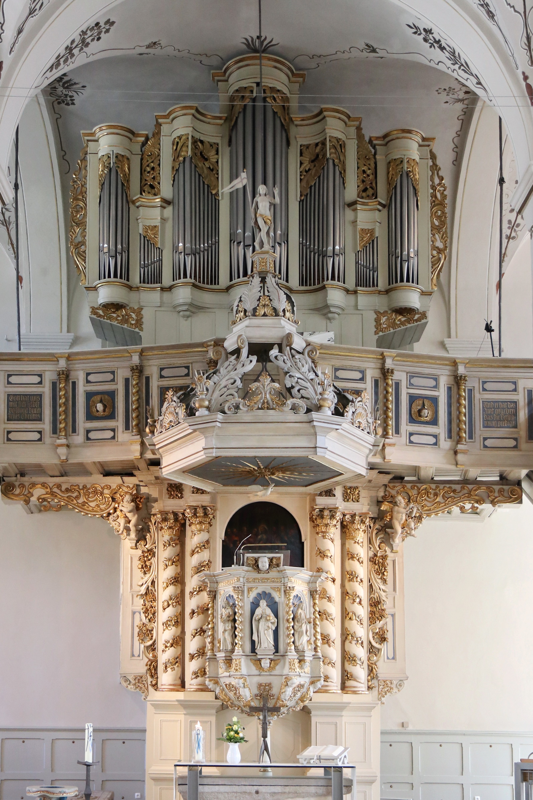 Lutherkirche in Altena, An der Kirche 1. This image shows a heritage building in Germany, located in the North Rhine-Westphalian city Altena (no. 1).